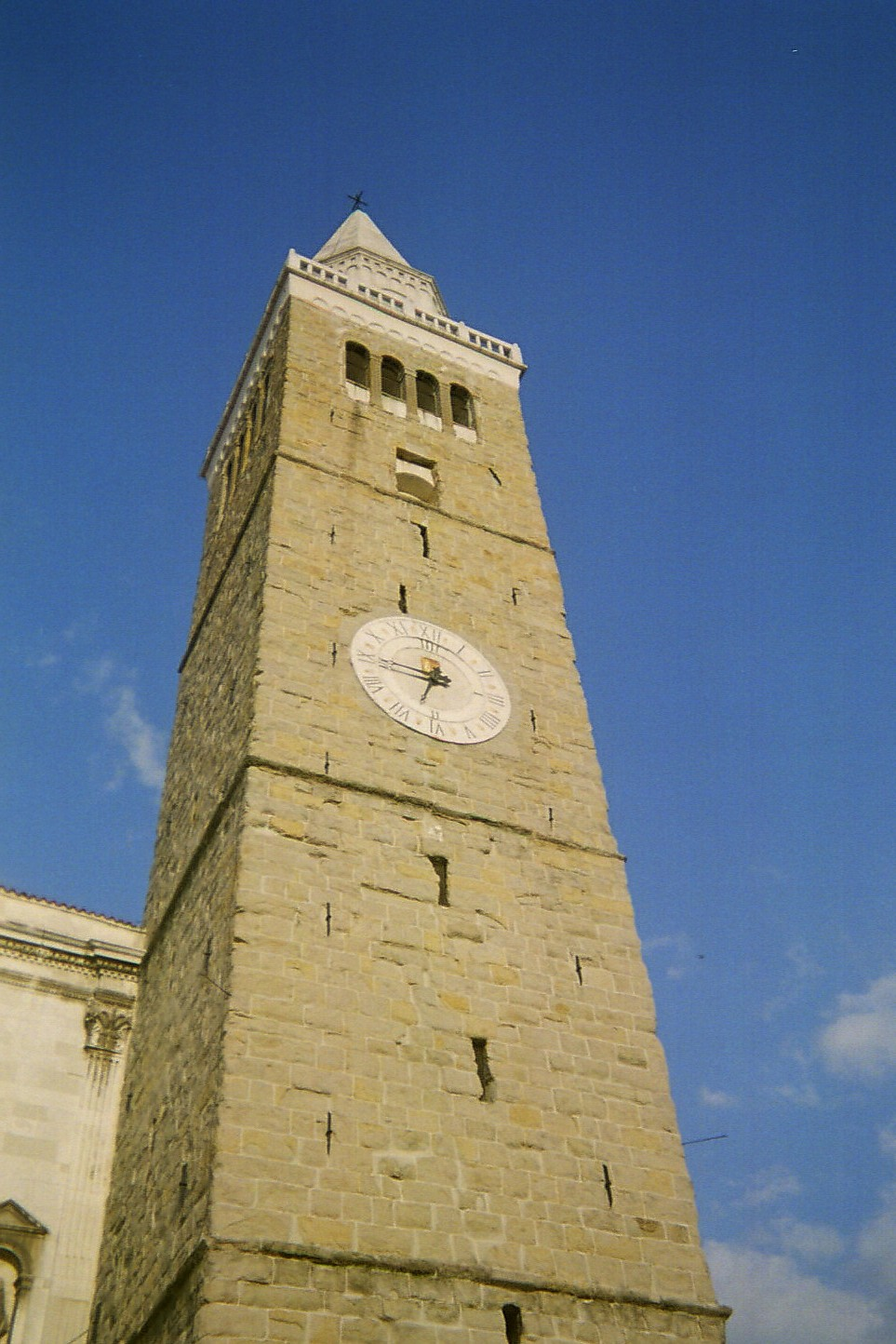 Cerkev Marije Vnebovzete, Koper, Slovenija